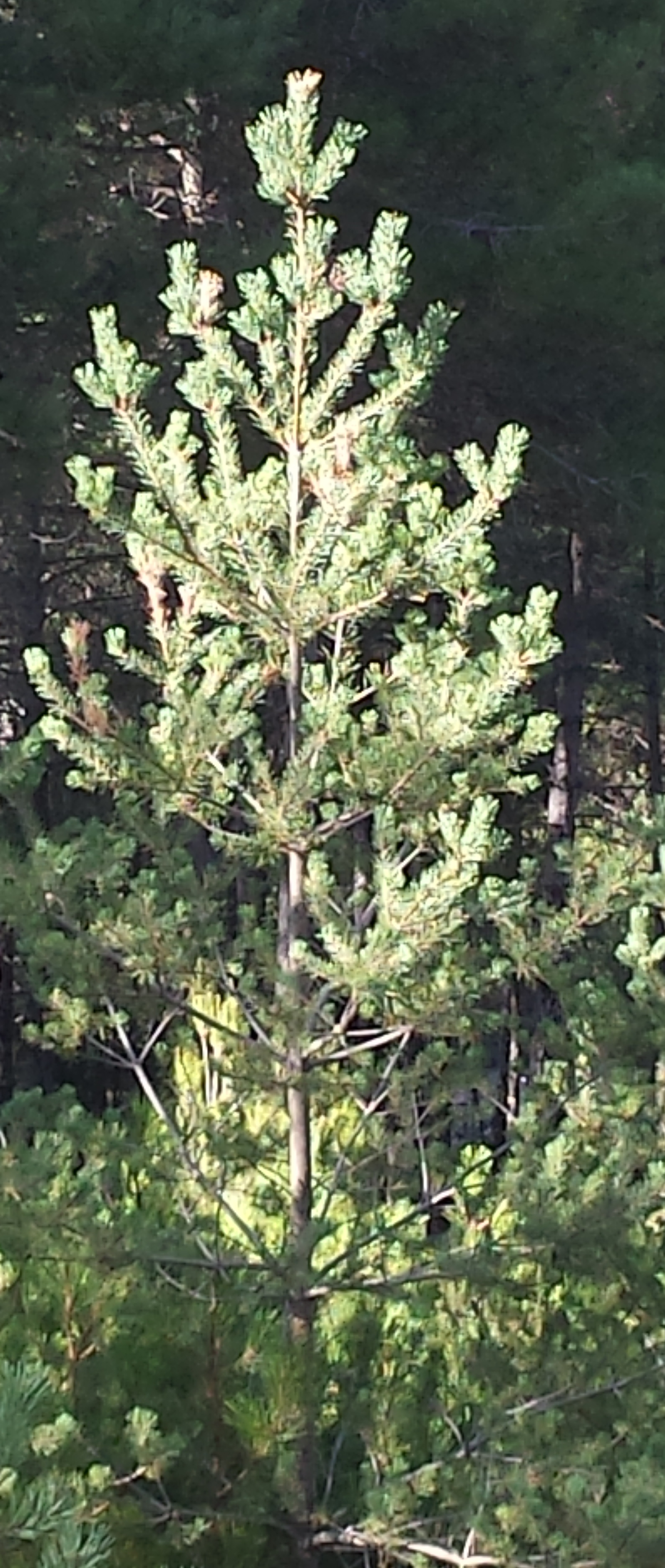 Pi rajolet jove a Castelltallat (Pinus sylvestris)